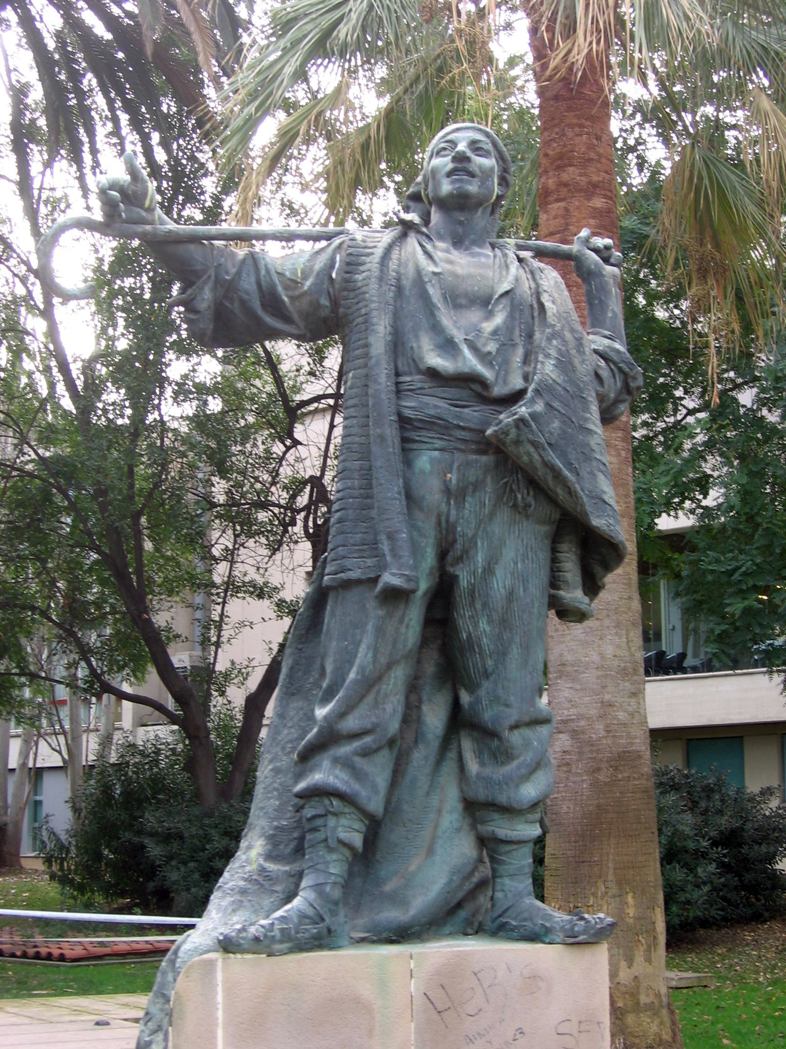 Manelic, Josep Montserrat, Montjuïc, Barcelona.